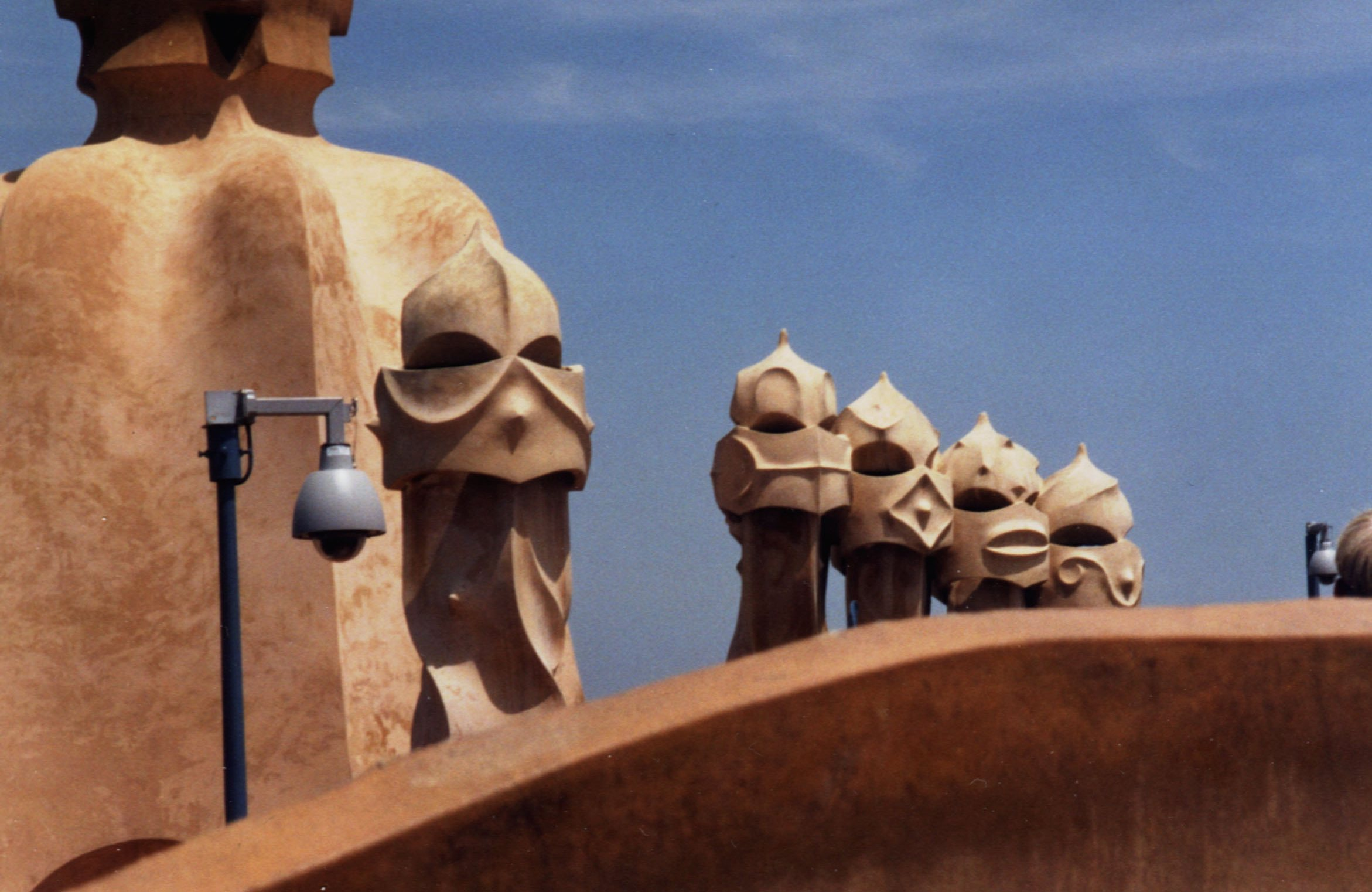 Chimeneas en el tejado de la Casa Milà (o La Pedrera), obra del Modernismo catalán de Antoni Gaudí i Cornet en el Eixample de Barcelona, España. Las chimeneas recuerdan cascos de guerreros.